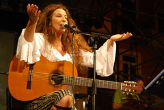 Autore:Domenico Sergio Antonacci Descrizione:Teresa de Sio in concerto ,edizione 2009